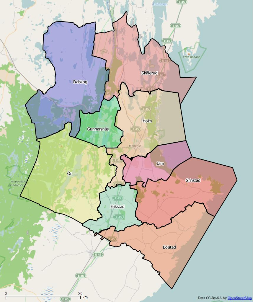 Distriktsindelningen i Melleruds kommun World file: 79.1383434623545412 0 0 -79.1383434623545412 1350184.90973365702666342 8154640.37287920620292425